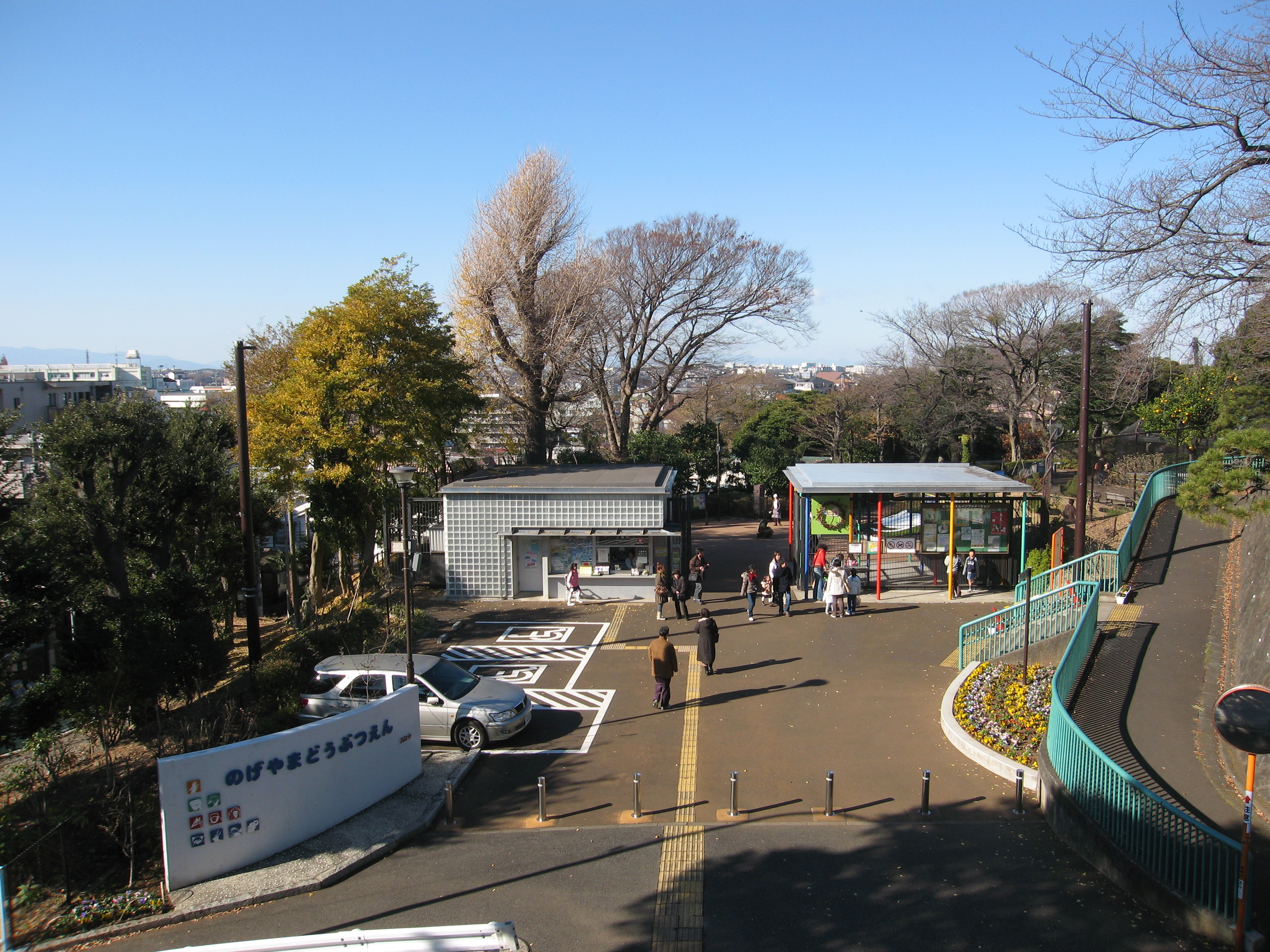 "Nogeyama Zoo" , Yokohama, Japan